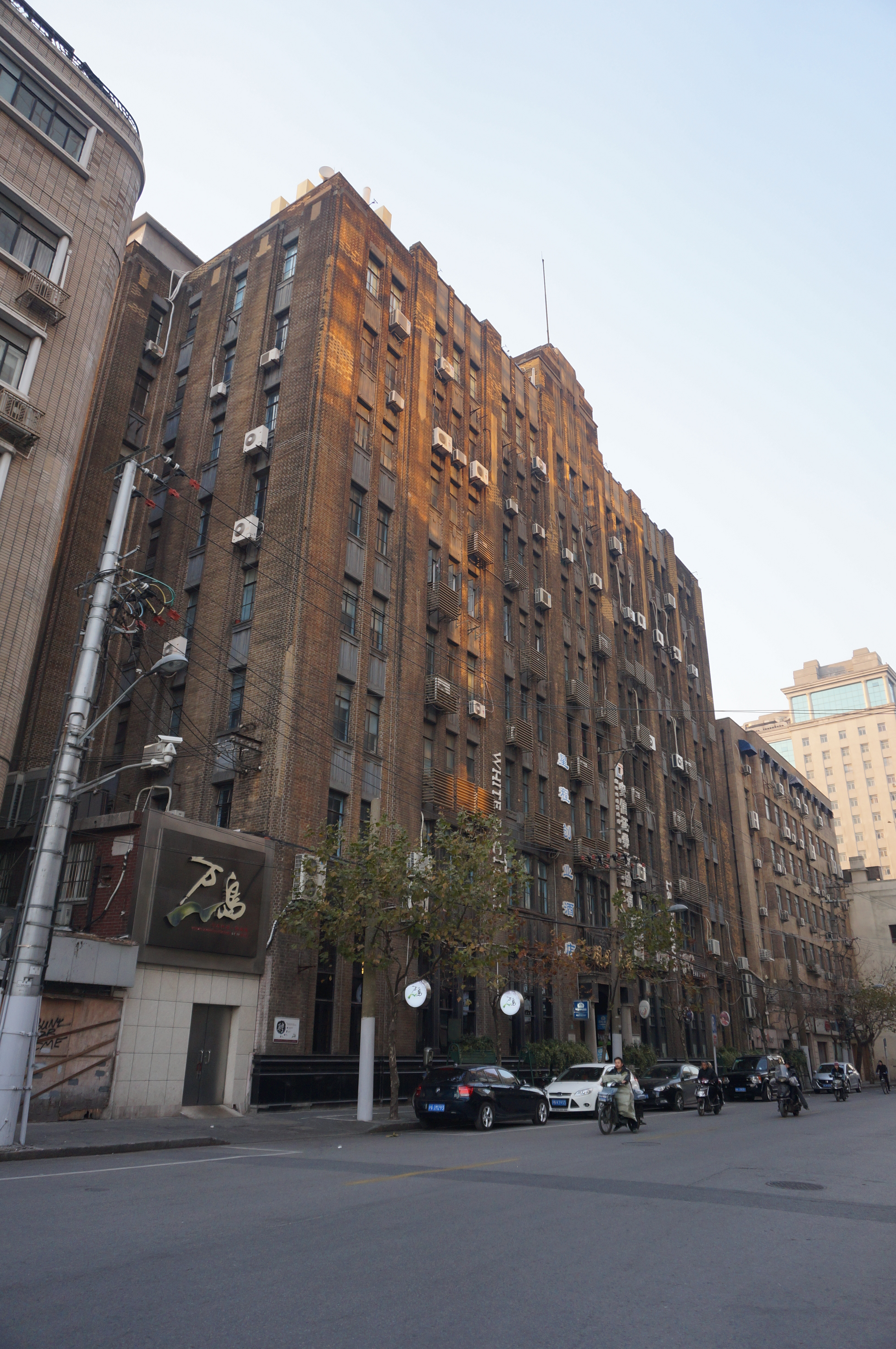 上海市第二批优秀历史建筑——创业大楼